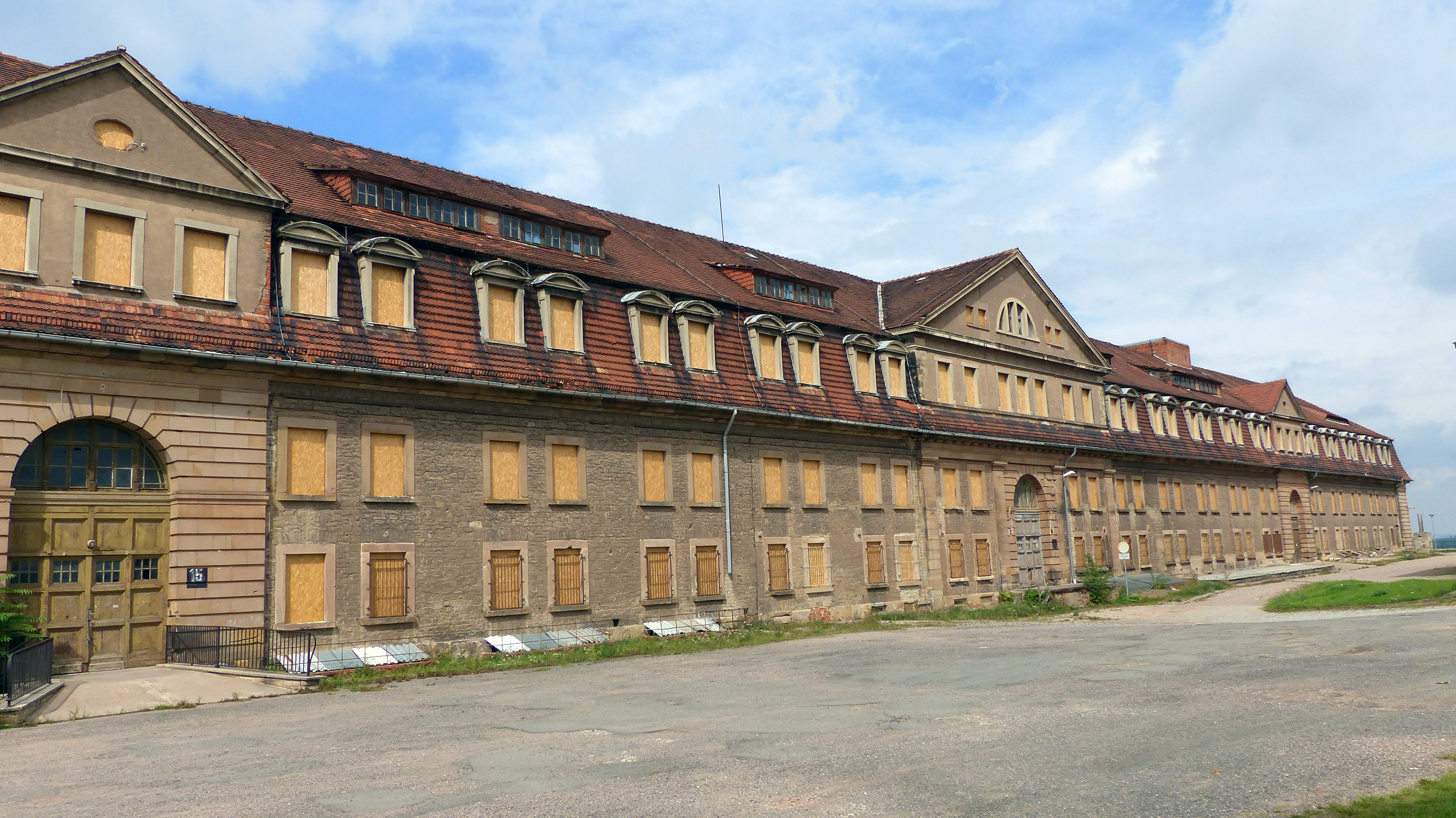 Denkmalgeschütztes Kasernengebäude (Defensionskaserne) der Zitadelle Petersberg in Erfurt